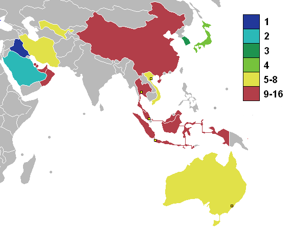 Copa disputada en Tailandia, Indonesia, Malasia y Vietnam